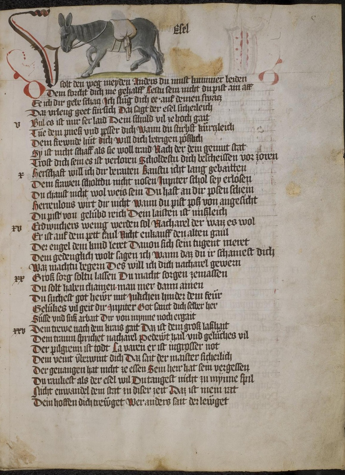 Codex Palatinus germanicus 7, Blatt 8r der Handschrift: Wahrsagebuch, Reimpaarzeilen, über dem Text: Tierbild Esel